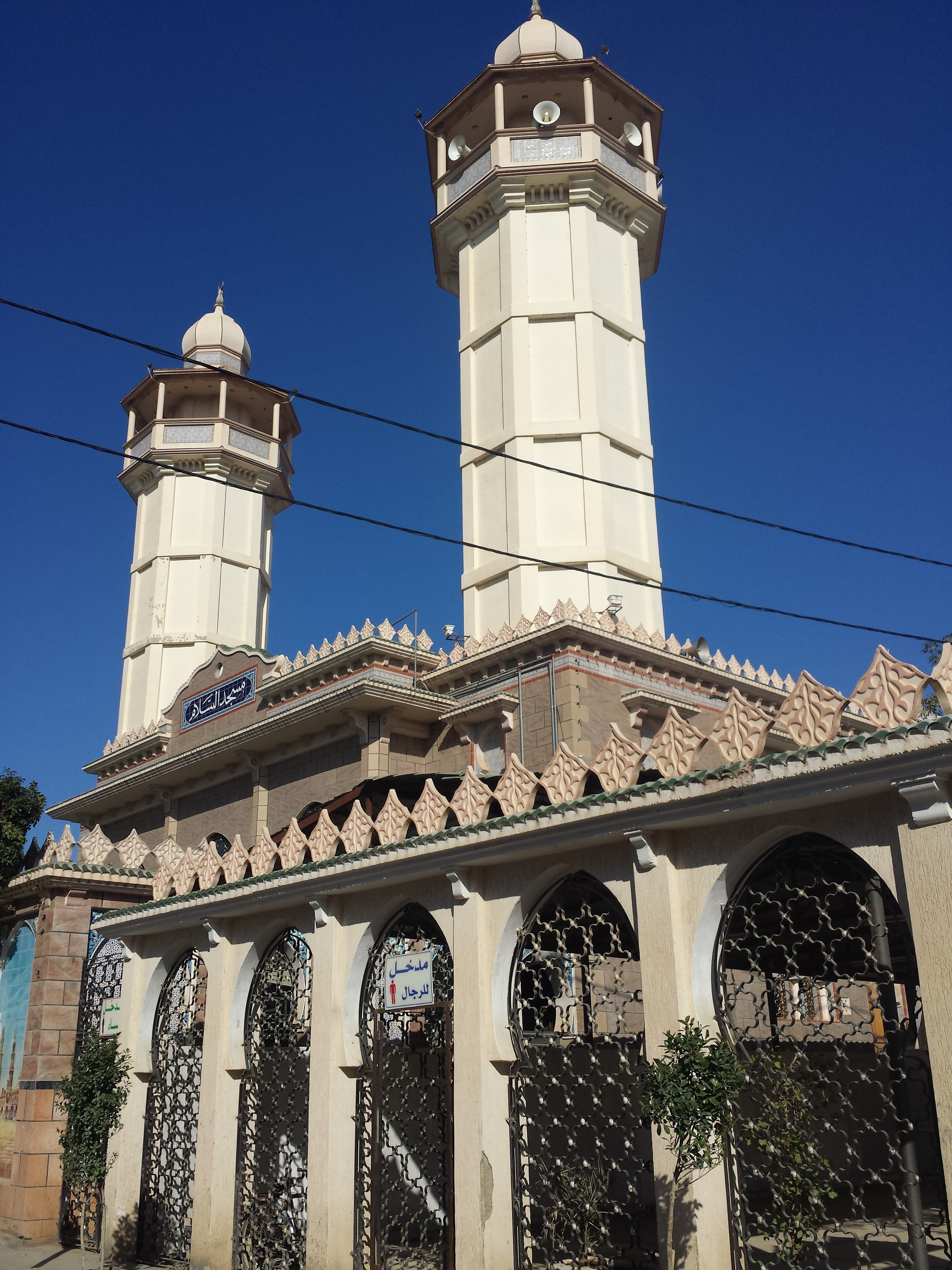 façade d'un mosqué à boukadir